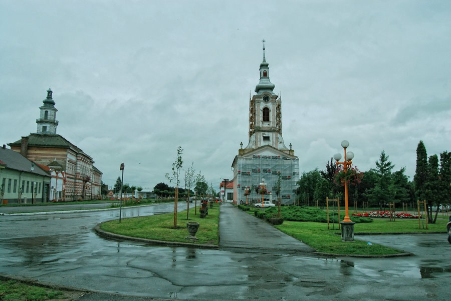 Biserica ortodoxă sârbească "Adormirea Maicii Domnului" Sannicolau Mare, jud Timis Cod LMI TM-II-m-A-06286